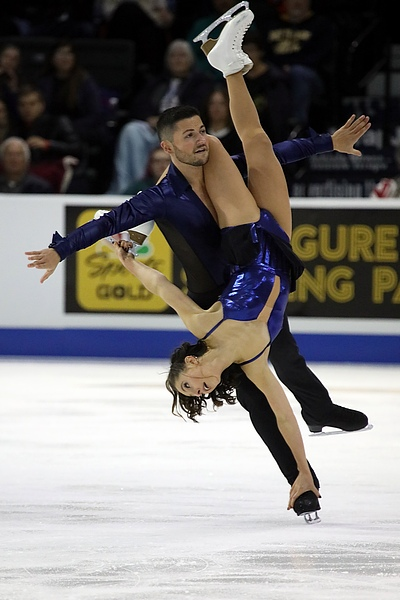 Лайла Фир и Льюис Гибсон на этапе Гран-при Skate America 2018